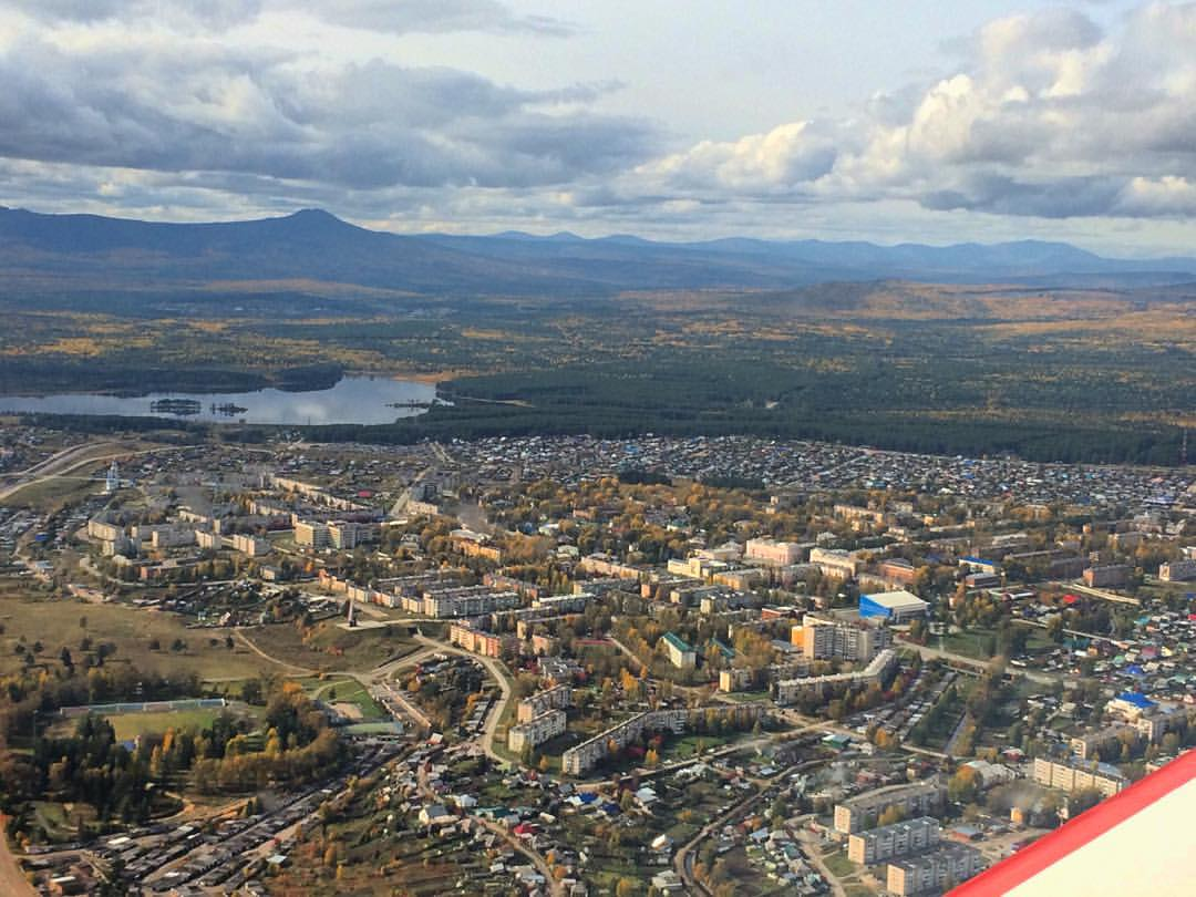 Город с высоты